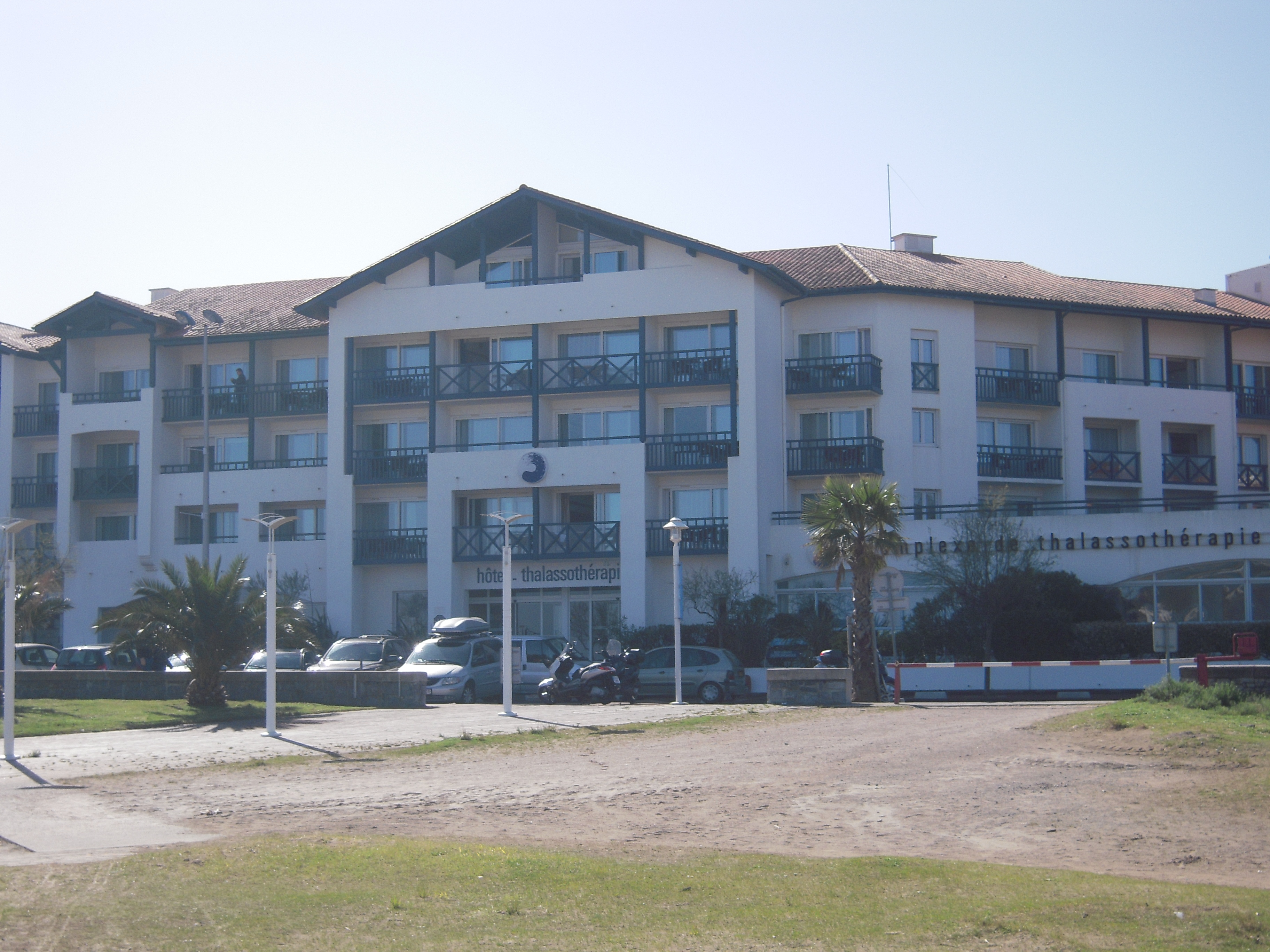 THALASSO. Station balnéaire d'Hendaye-Plage au bord de l'Océan, où se trouvent le complexe de thalassothérapie Serge Blanco, le port de plaisance (le 3e d'Aquitaine : 853 anneaux) et la majeure partie des restaurants de la ville.